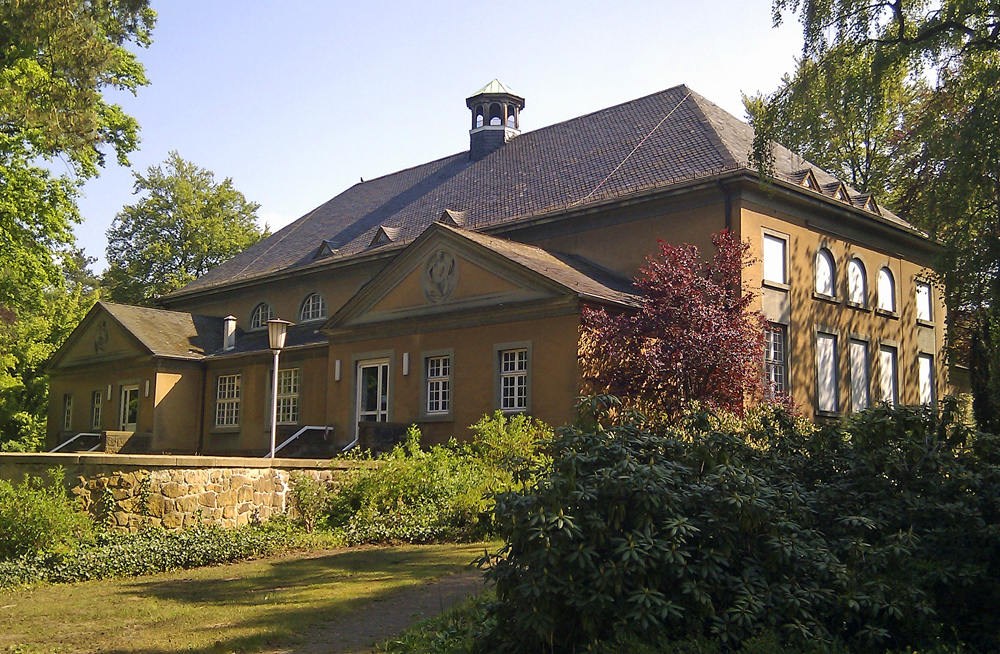 Historischer Festsaal der LWL-Klinik Gütersloh This image shows a heritage building in Germany, located in the North Rhine-Westphalian city Gütersloh (no. A 196).